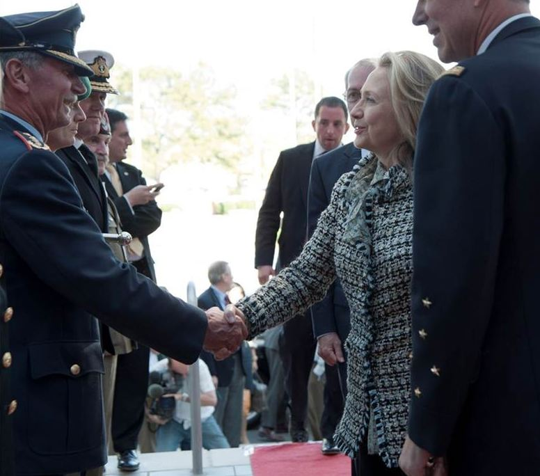 General Karlheinz Viereck und Außenministerin Hillary Clinton in Norfolk